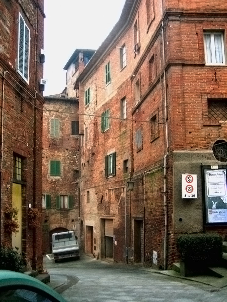 Città della Pieve, Umbria, Italiastreet in città della pieve